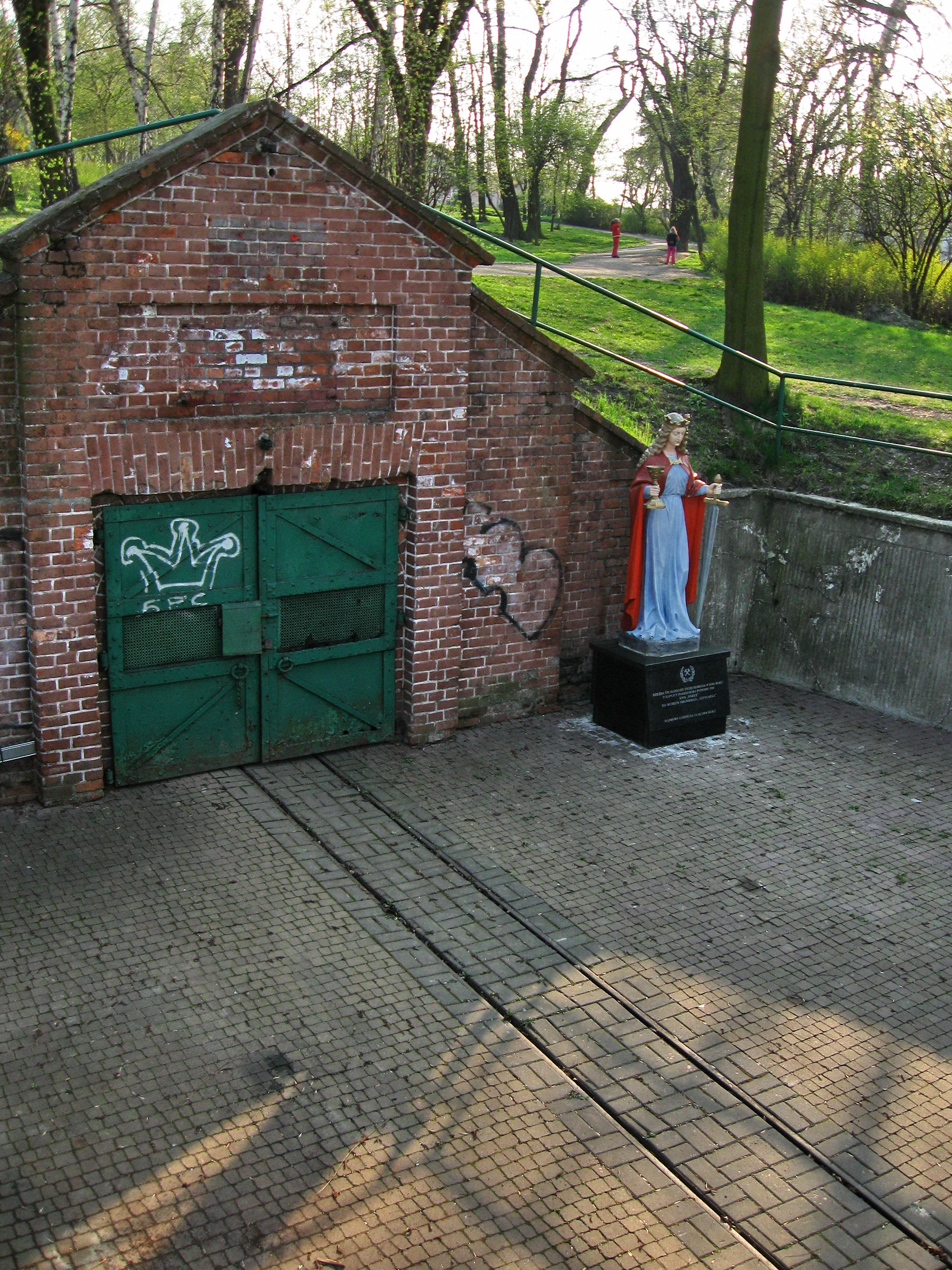 Sztolnia należąca do Muzeum Sztygarka w Dąbrowie Górniczej